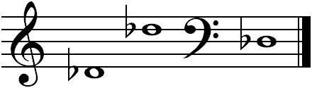 Nuty des na pięciolinii.